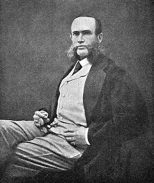 Budberg a.f. (1817—1881)